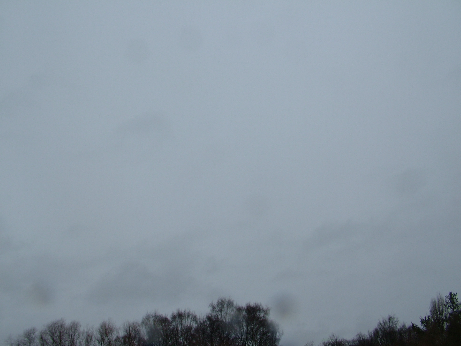 Kihtsajupilved põhjustamas lausvihma Tartus, 7.4.2011. a.